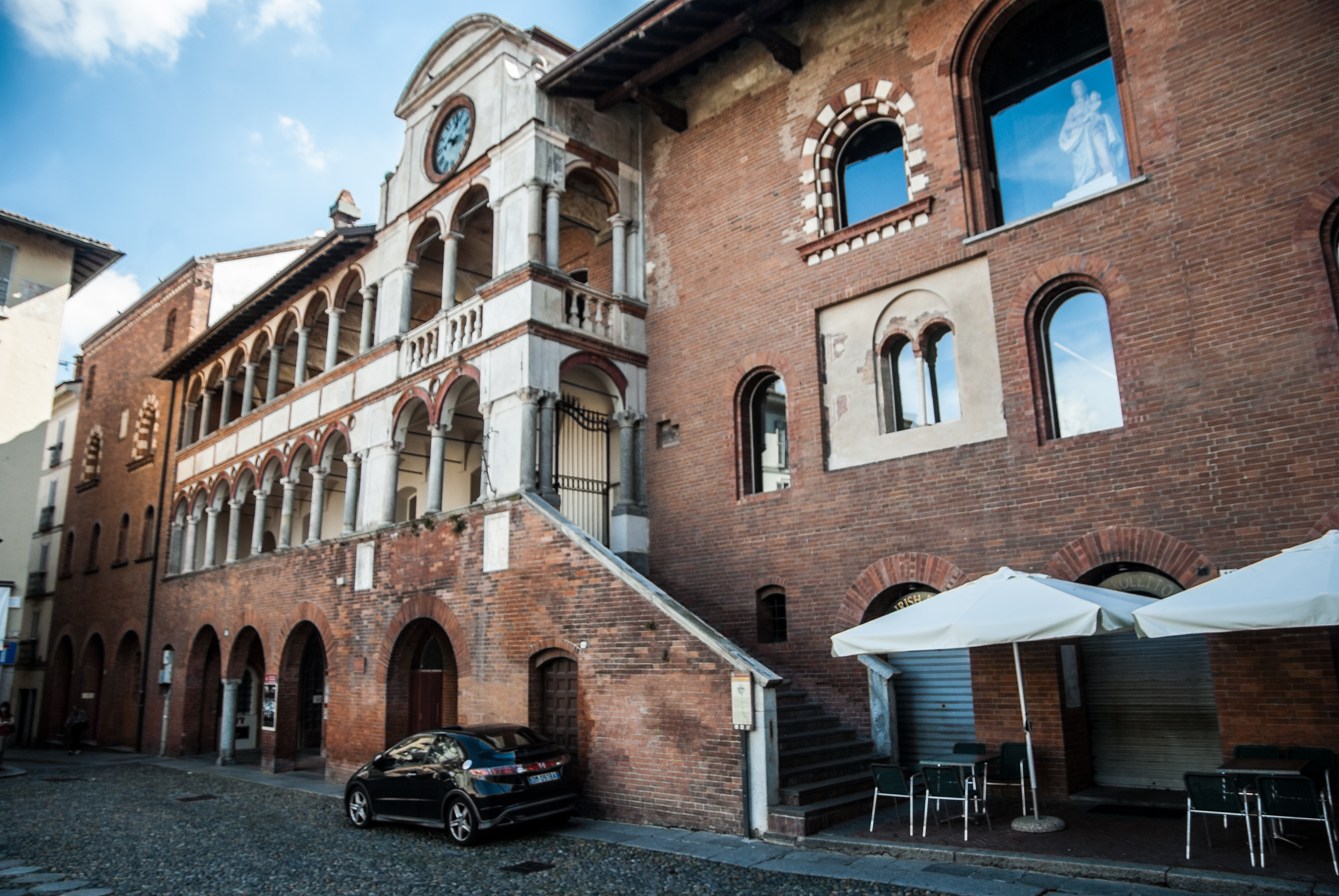 Palazzo Broletto This is a photo of a monument which is part of cultural heritage of Italy.